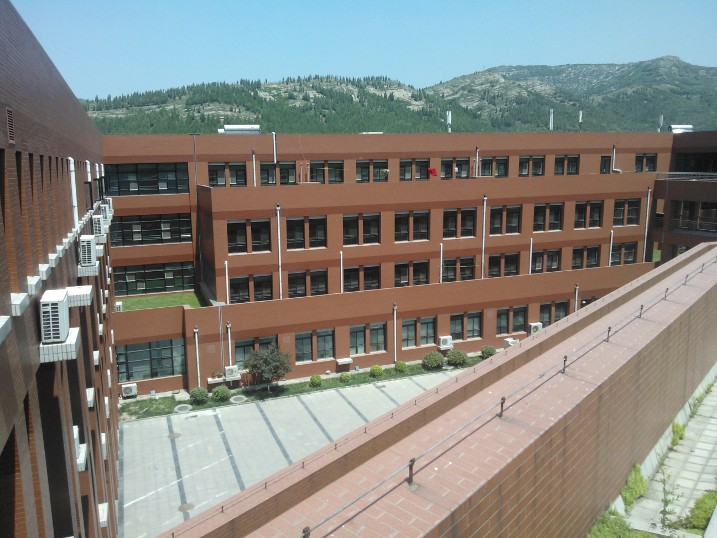 Gebäude A2 Campus Nr. 6 (Xing Longshan)